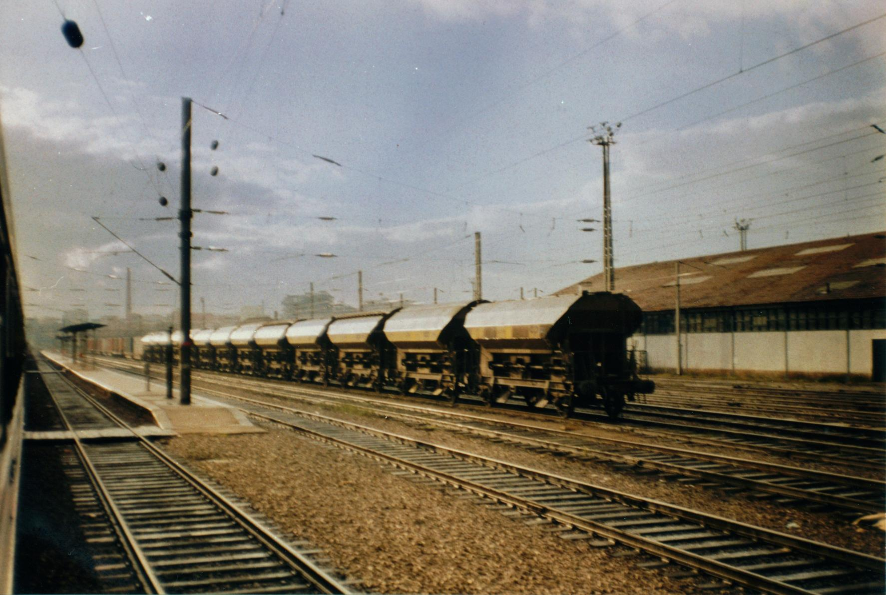 a bordo do InterRegional 824. Tipo: Vagões-tremonha (transporte de cereal) Local: Estação de Vila Nova de Gaia [Linha do Norte, PK 332] Data e hora: 6 de Outubro de 1994 [15h41] Material: CP Tdgs [série 074 1] digitalização de fotografia analógica.